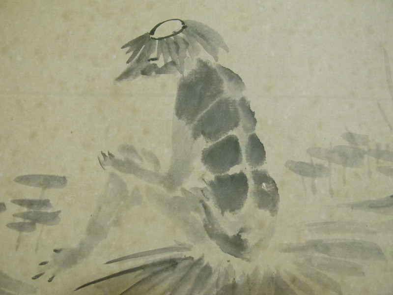 Kappa Tuschzeichnung